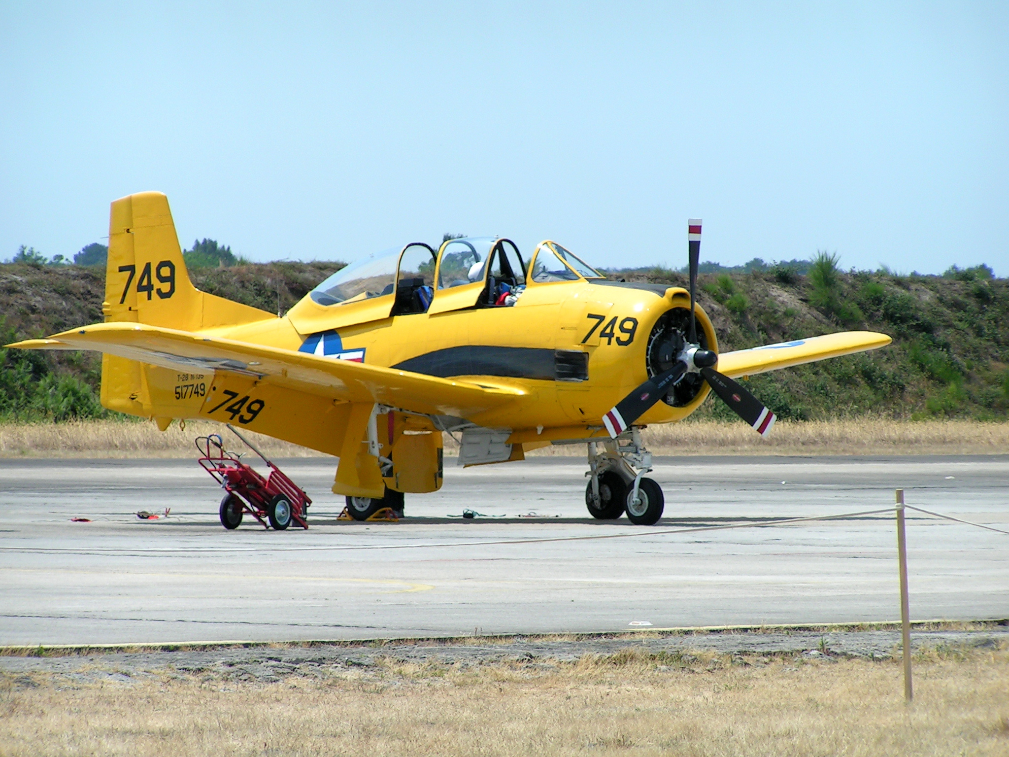 T-28 Trojan 749 meeting Cazaux